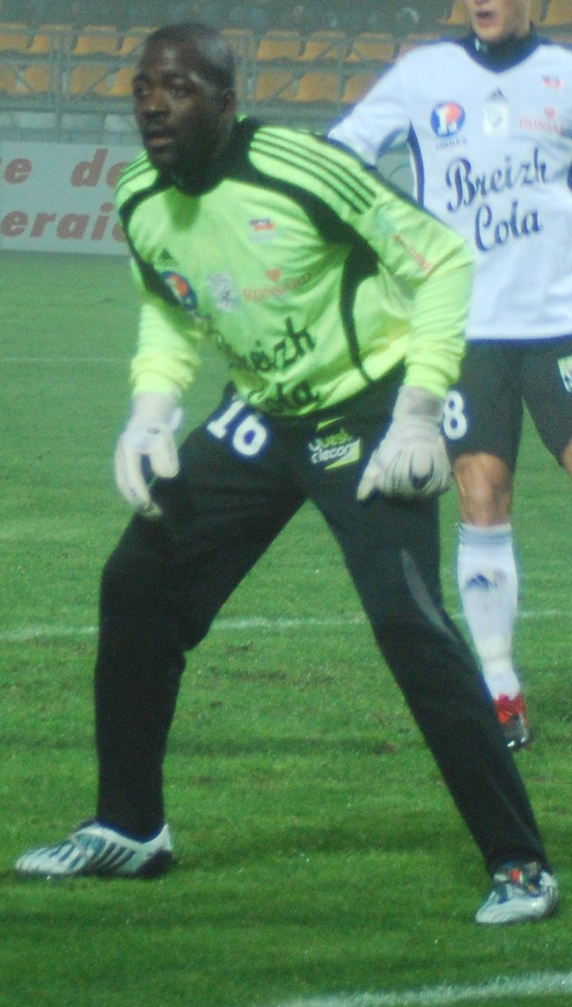 photo gnanhouan